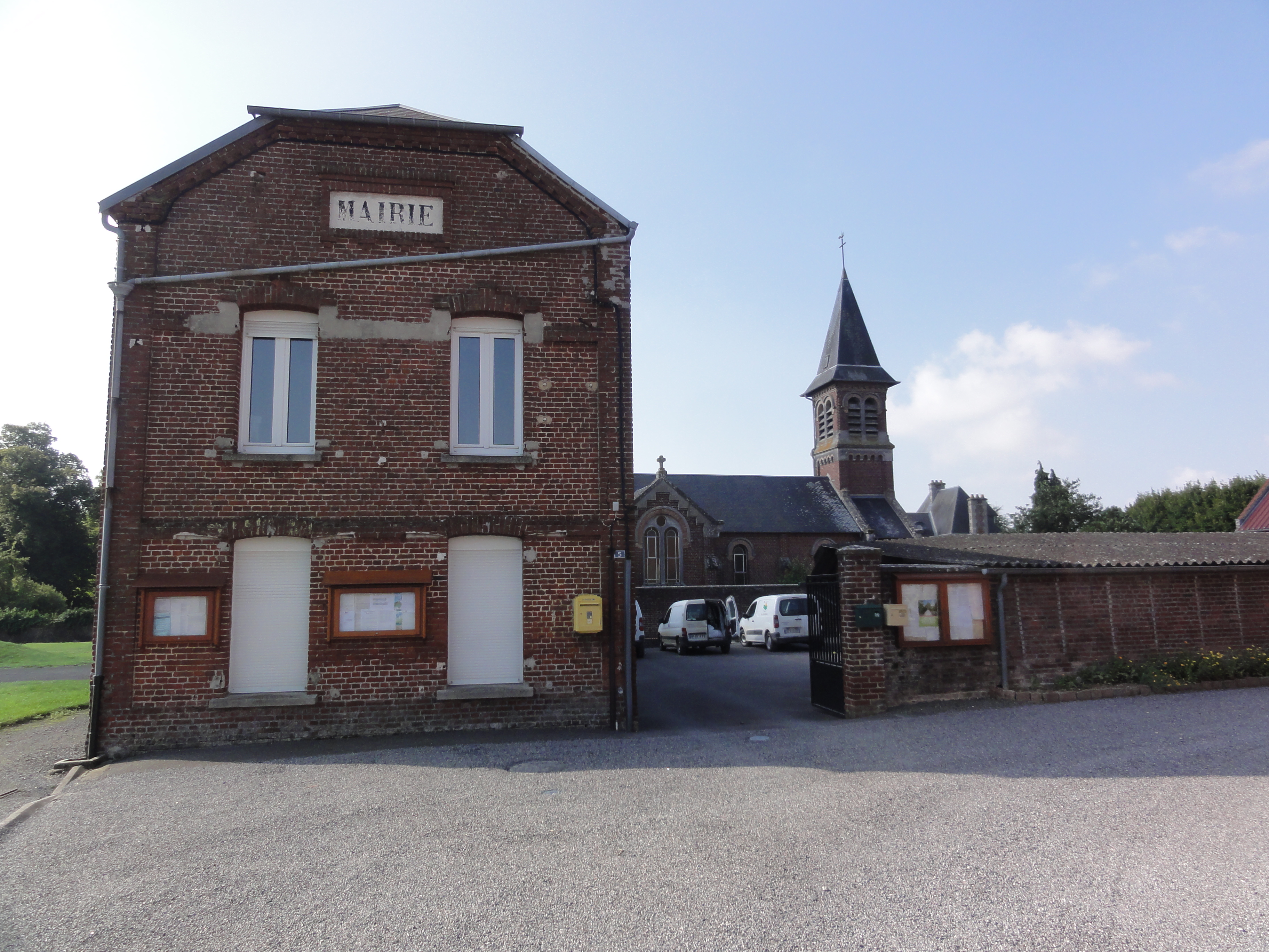 Marcy (Aisne) mairie